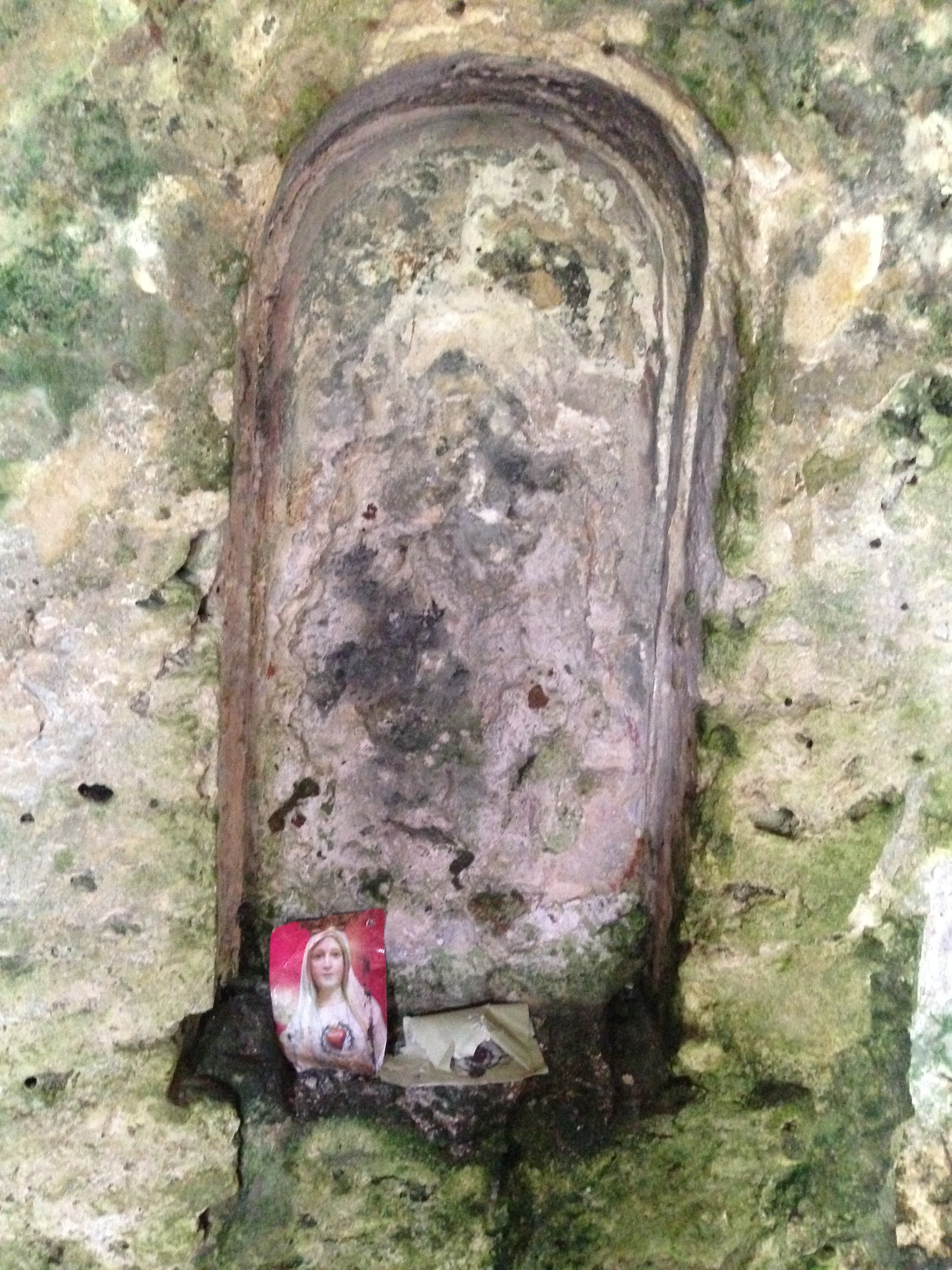 Lunetta con immagine votiva sbiadita